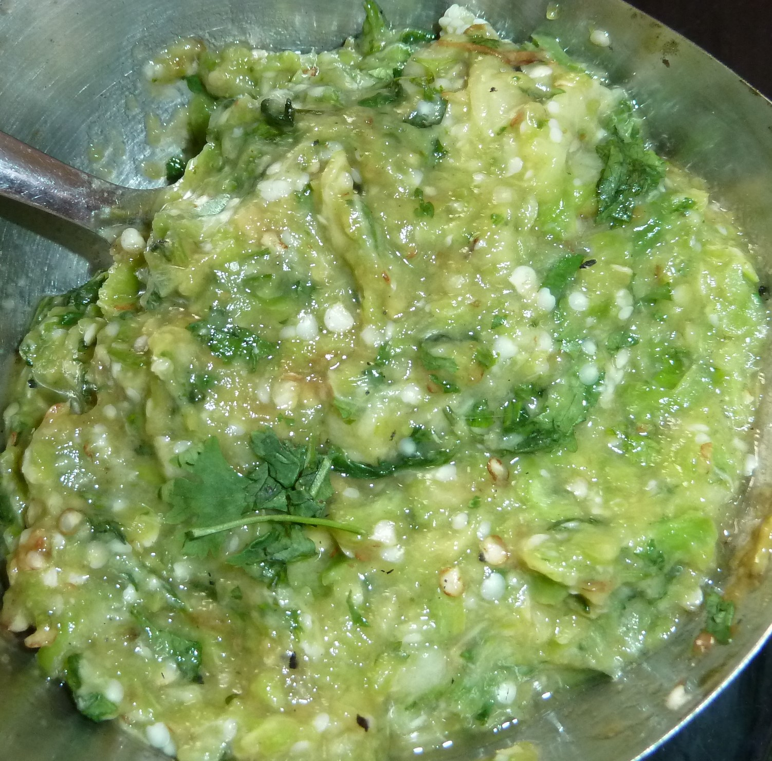 వంకాయ పచ్చిమిర్చి పచ్చడి